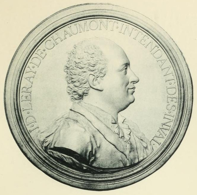 Portrait of Jacques-Donatien Le Ray de Chaumont (1726–1803)